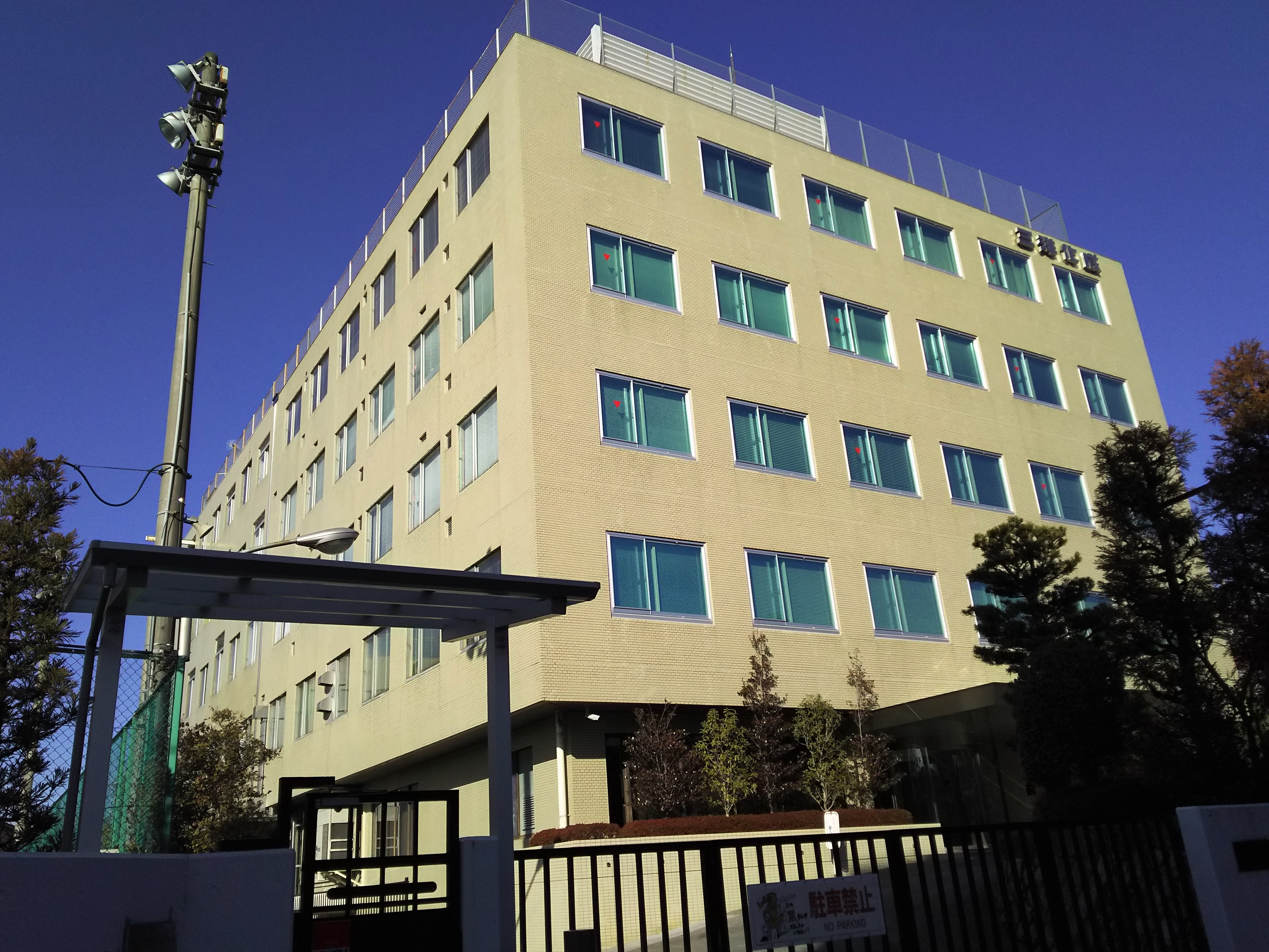 三洋化成工業本社（京都市東山区）